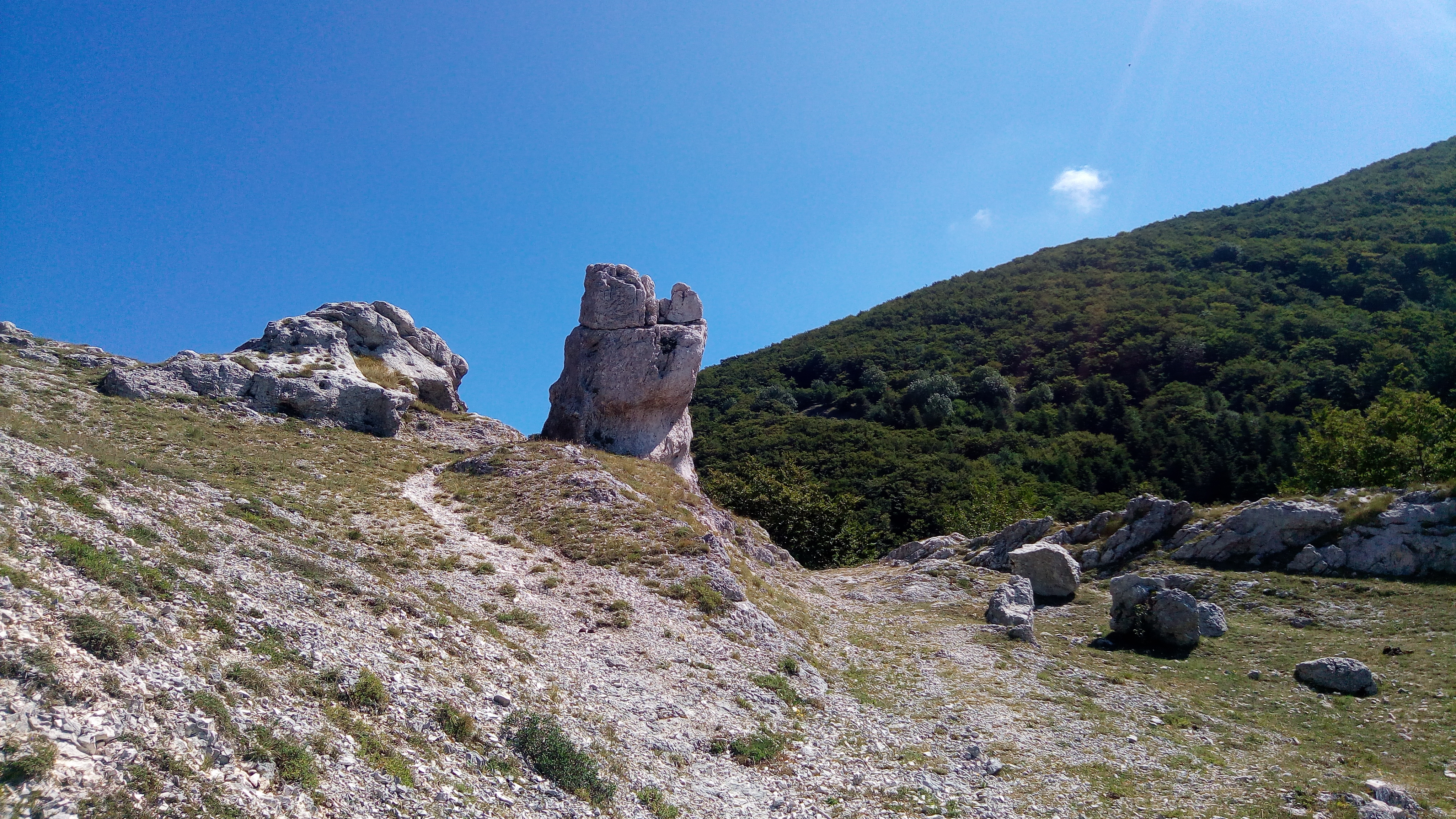 Formazione calcarea del Monte Cucco nota come il Sasso.